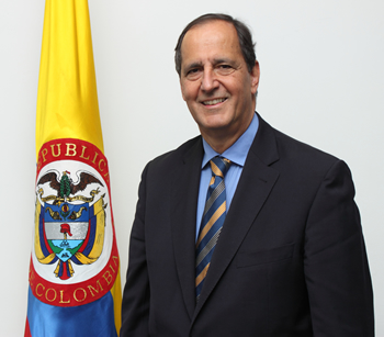 El Ministro de Agricultura y Desarrollo Rural, Juan Camilo Restrepo.